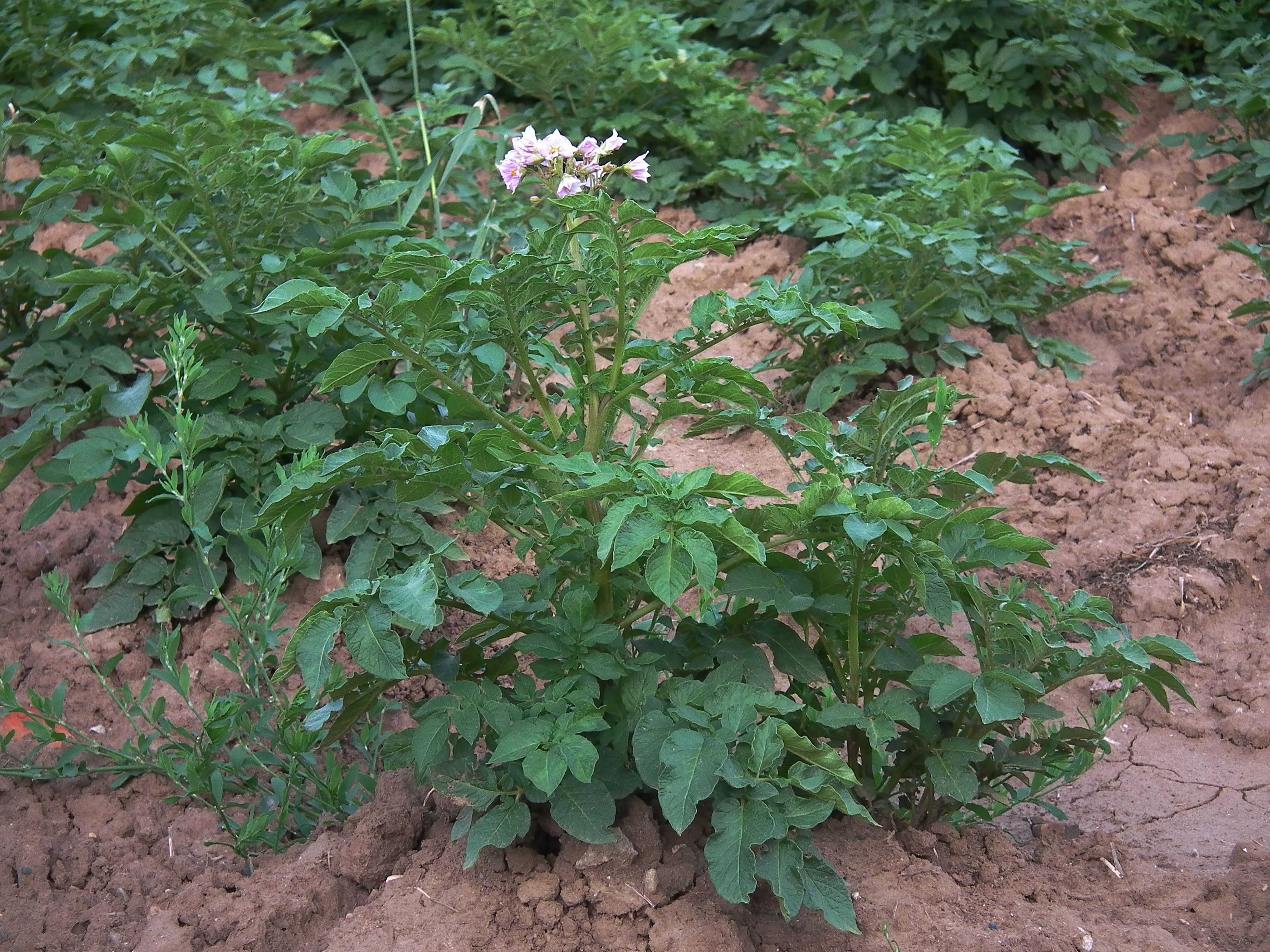 Kartoffel (Solanum tuberosum), fotografiert in Heidelberg (Baden-Württemberg, Deutschland)